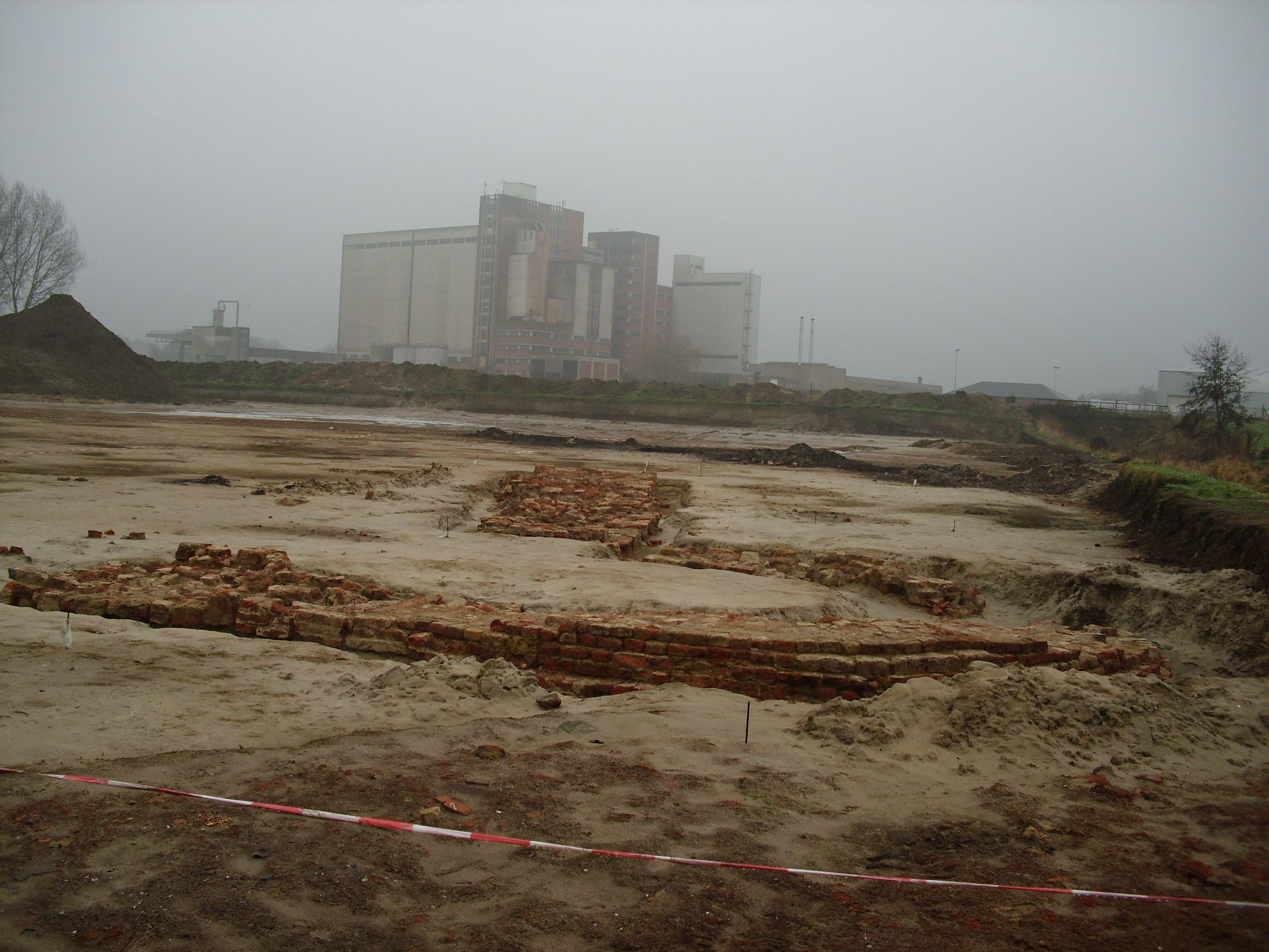 Een voorlopig ongedateerde vondst - Woestijne - Aalter - Oost-Vlaanderen - Vlaanderen - België